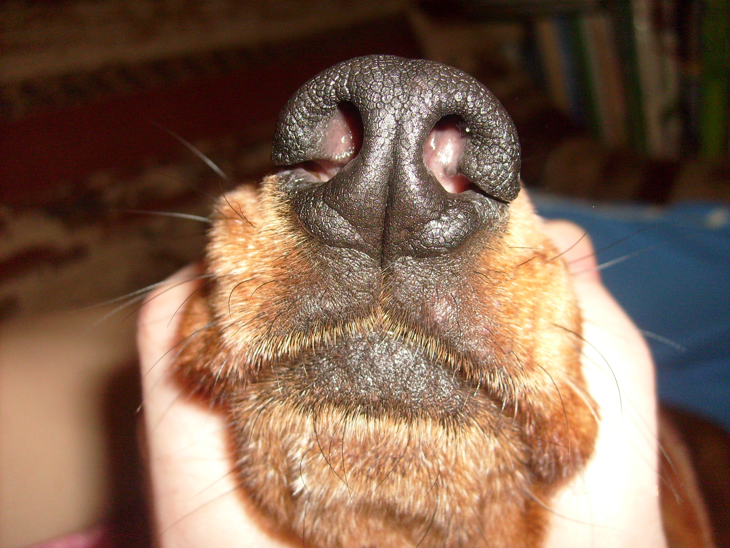 Морда собаки.